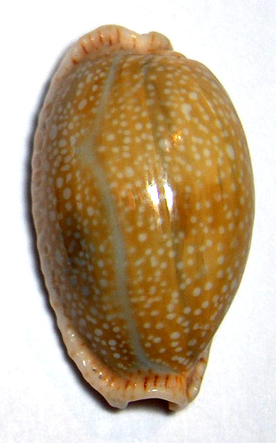 Erosaria erosa (synonym : Cypraea erosa) Ile de Cebu (Philippines) Author : myself (clmiadfl)